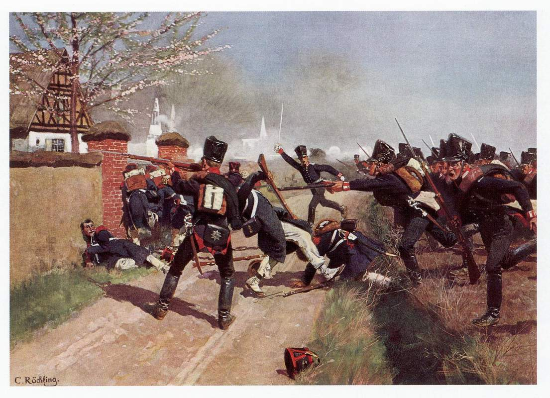 Preußisches Füsilier-Bataillon des „1. Garderegiment zu Fuß“ in der Schlacht bei Großgörschen am 2.5.1813